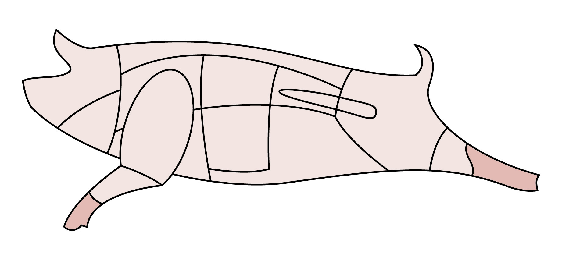 Schematische Darstellung eines Schweins, Schweinepfoten.